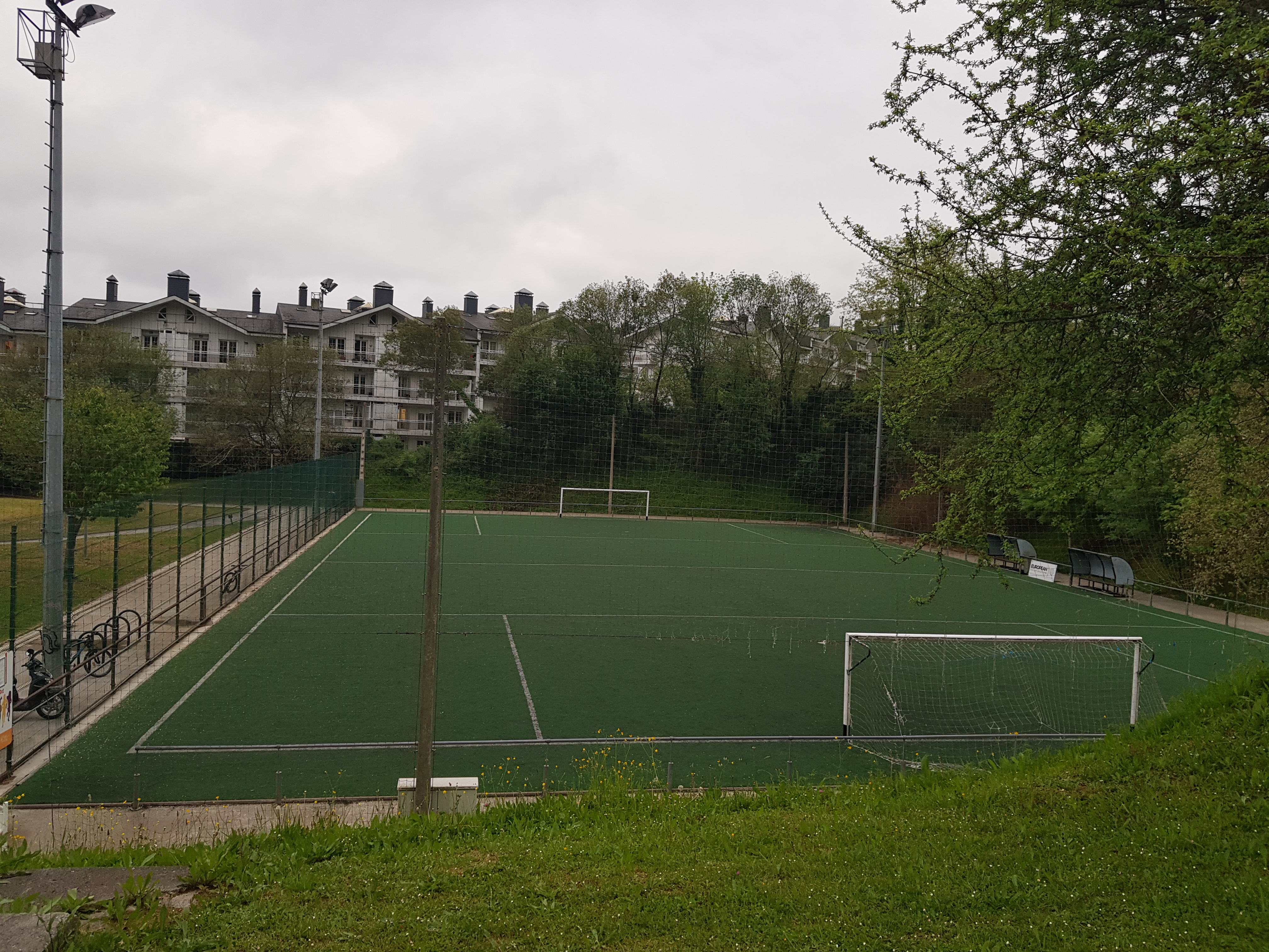 Futbol 7-ko zelaia